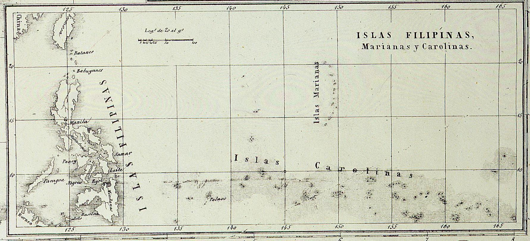 Carta de España de Bachiller con todas sus posesiones de ultramar e islas adyacentes 1858, Fragmento: Islas Marianas,Palaos y Carolinas (Oceanía)